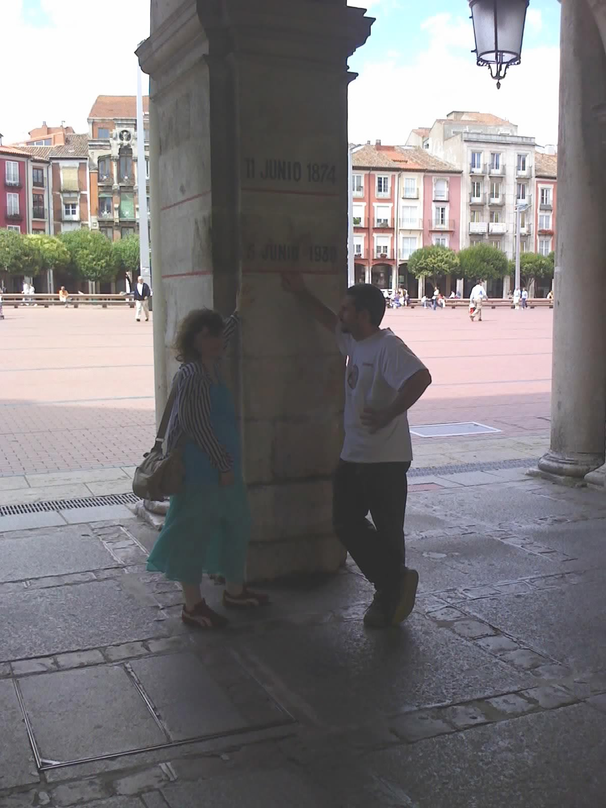 Indicadores de a donde llegaron las inundaciones en Burgos